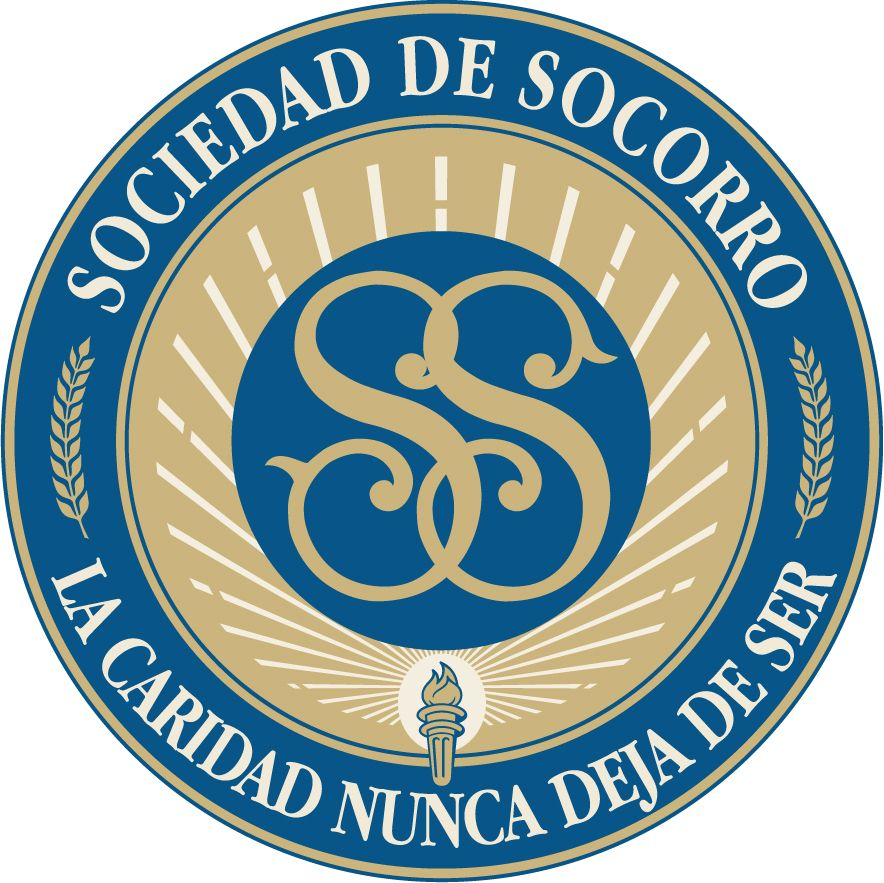 Este es el logo de la sociedad de socorro fundada en 1842